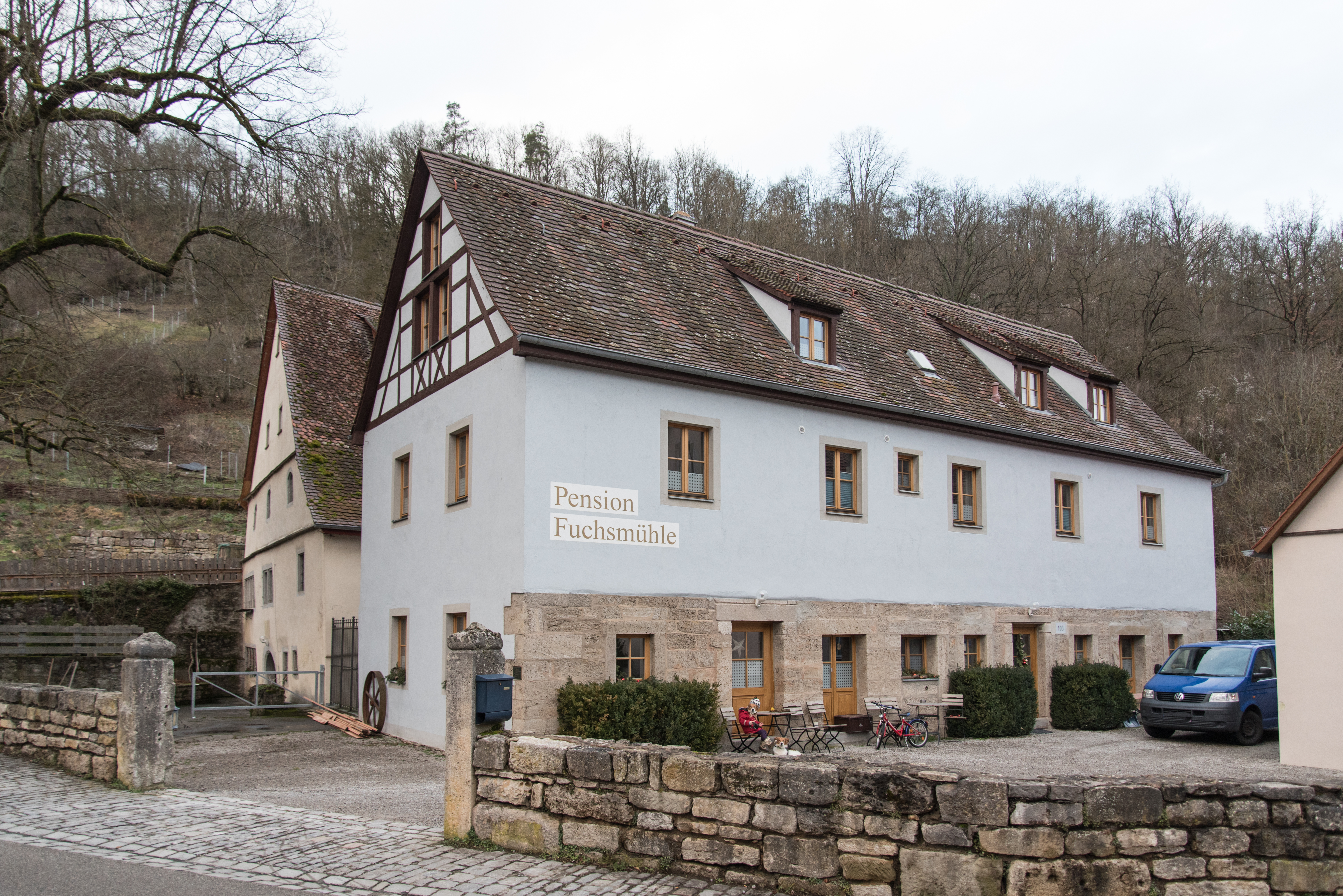 Rothenburg ob der Tauber, Taubertalweg 103a